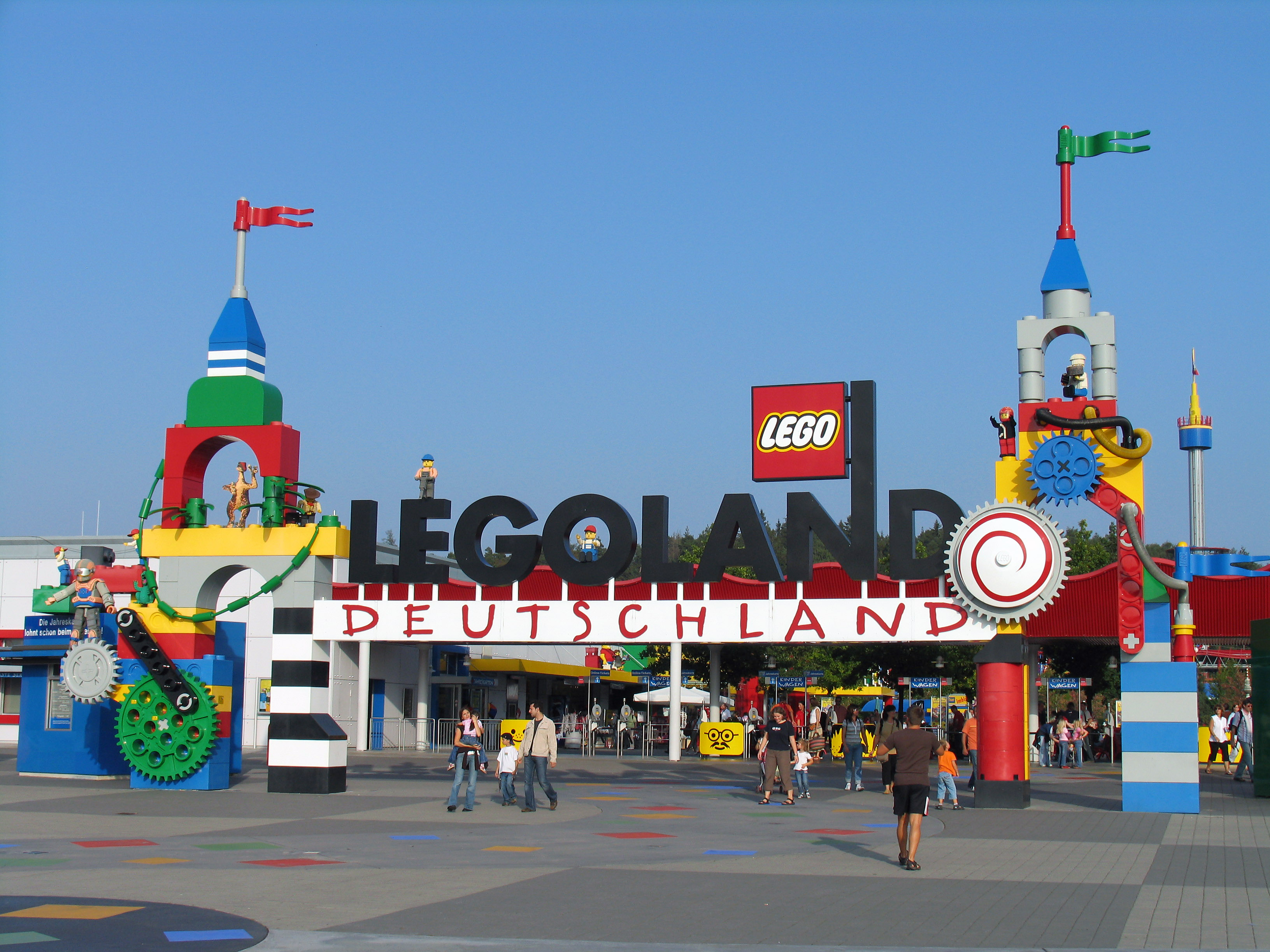 Entrance of Legoland Deutschland